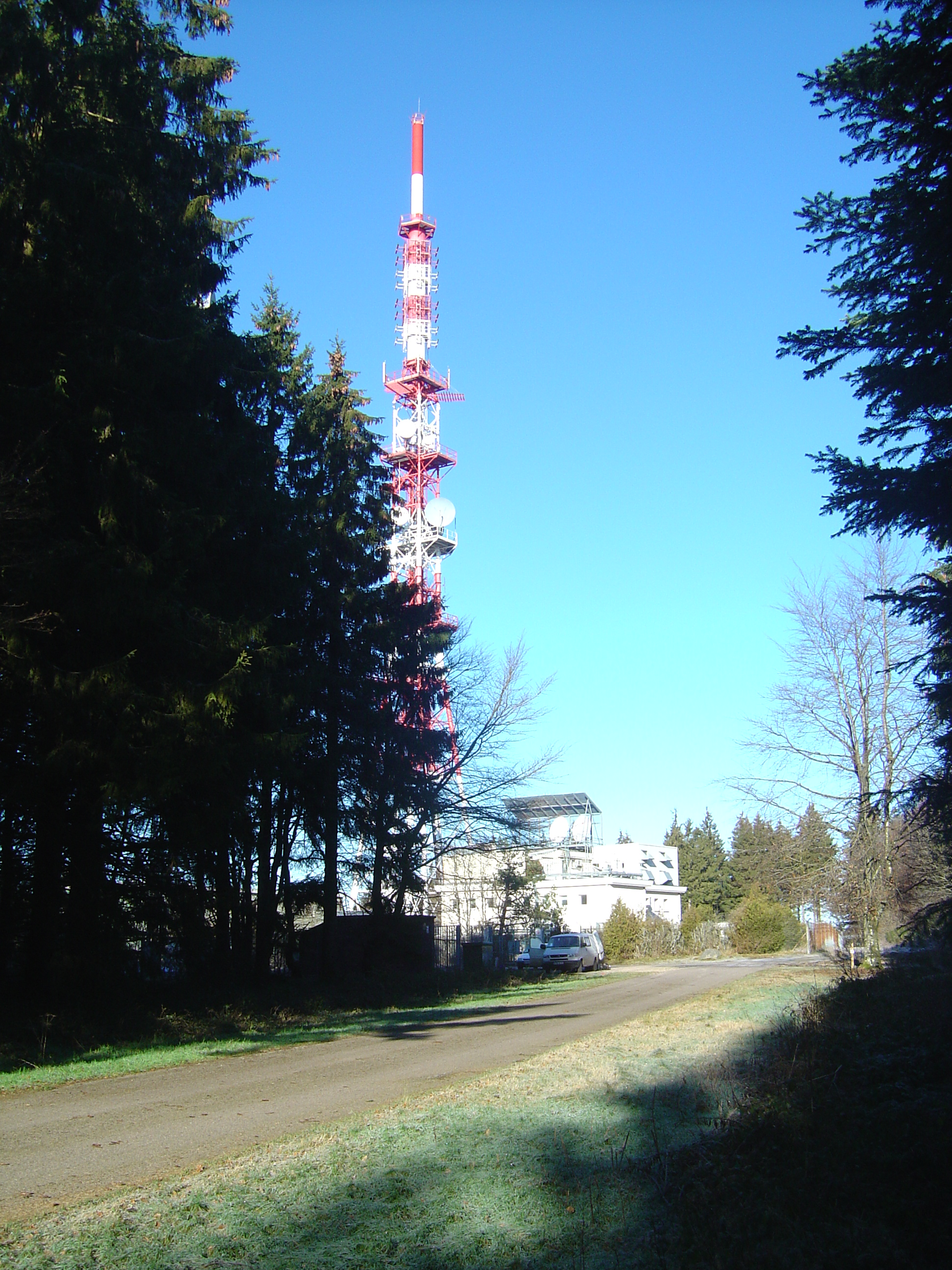 Antenne au Sommet du Haut-Folin (901m)